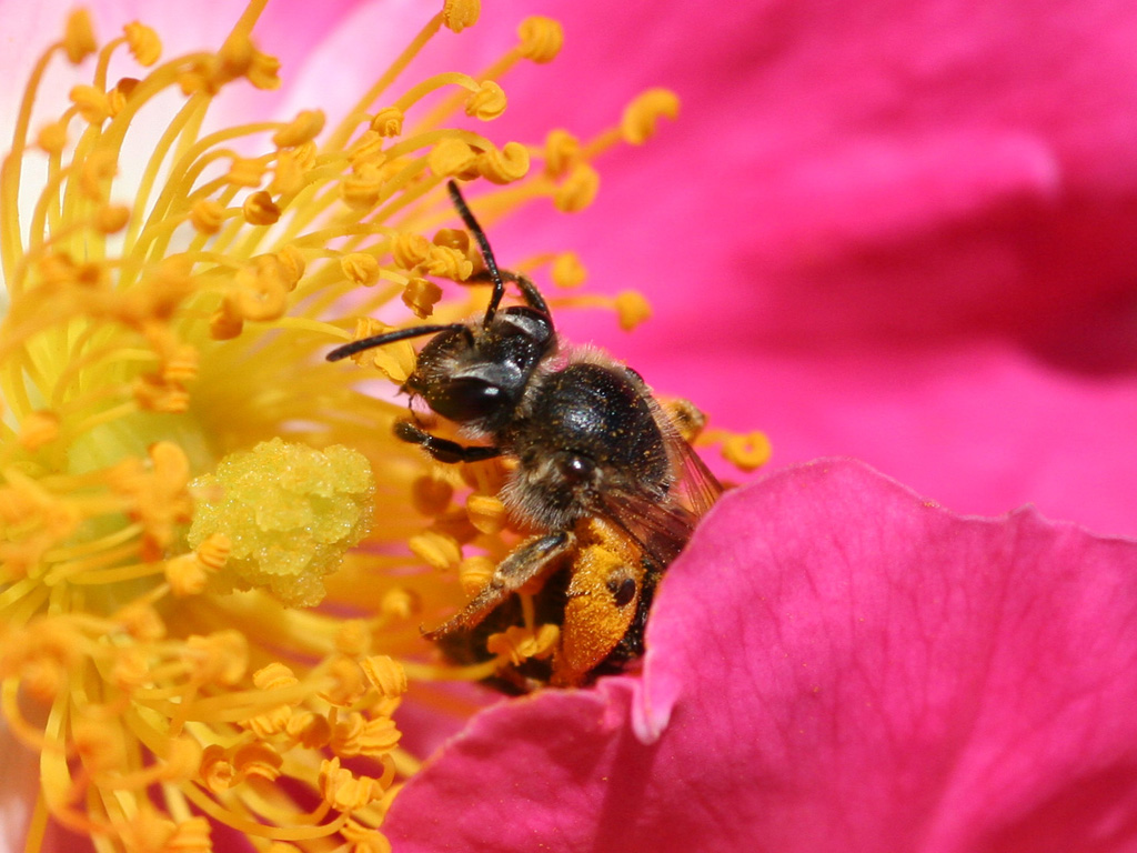 Ape che impollina una rosa